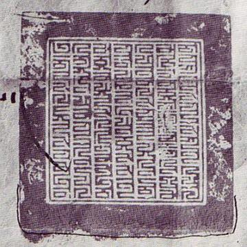 Amtssiegel des tibetischen Regenten sTgag-brag Pandita